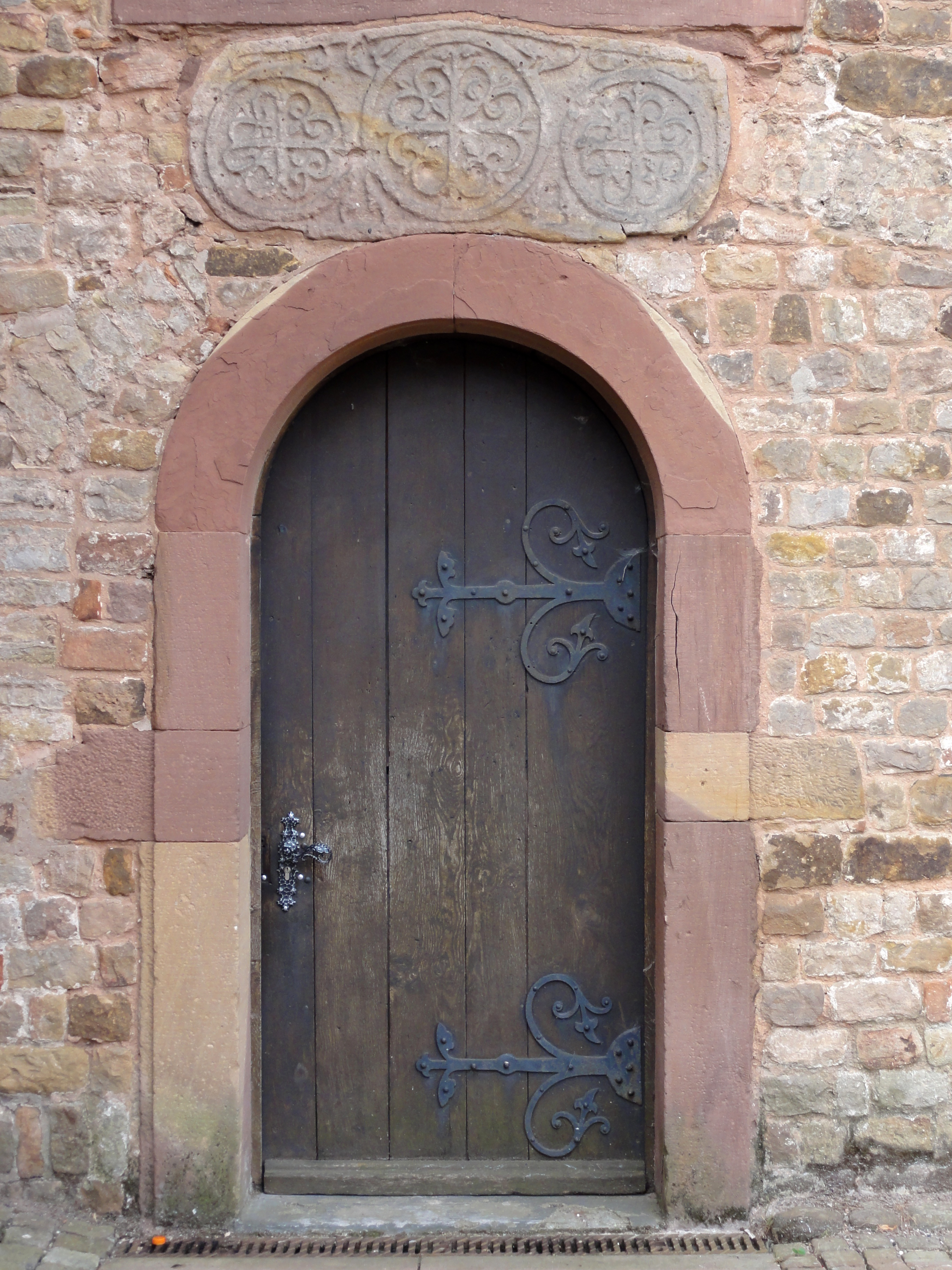 Alsace, Bas-Rhin, Surbourg, Abbatiale Saint-Jean-Baptiste (PA00085200, IA00119029): Porte latérale avec linteau roman.